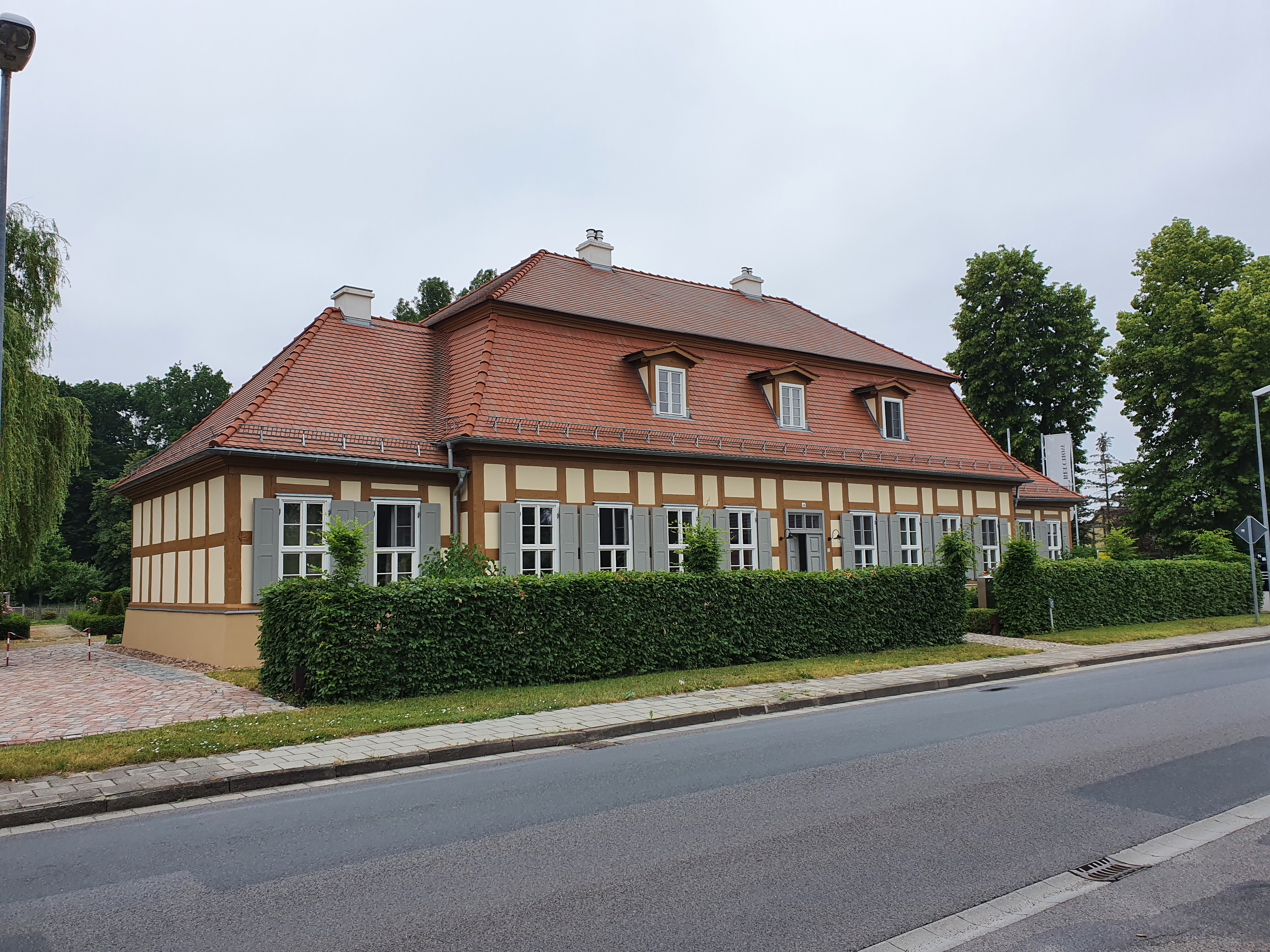 Das denkmalgeschützte Jagdhaus Groß Beuchow im gleichnamigen Ortsteil der Stadt Lübbenau/Spreewald im Landkreis Oberspreewald-Lausitz in Brandenburg im Juni 2020. Das Gebäude wurde im Jahr 1746/47 nach Auftrag der Grafen zu Lynar gebaut und wird seit Mai 2016 als Hotel genutzt.